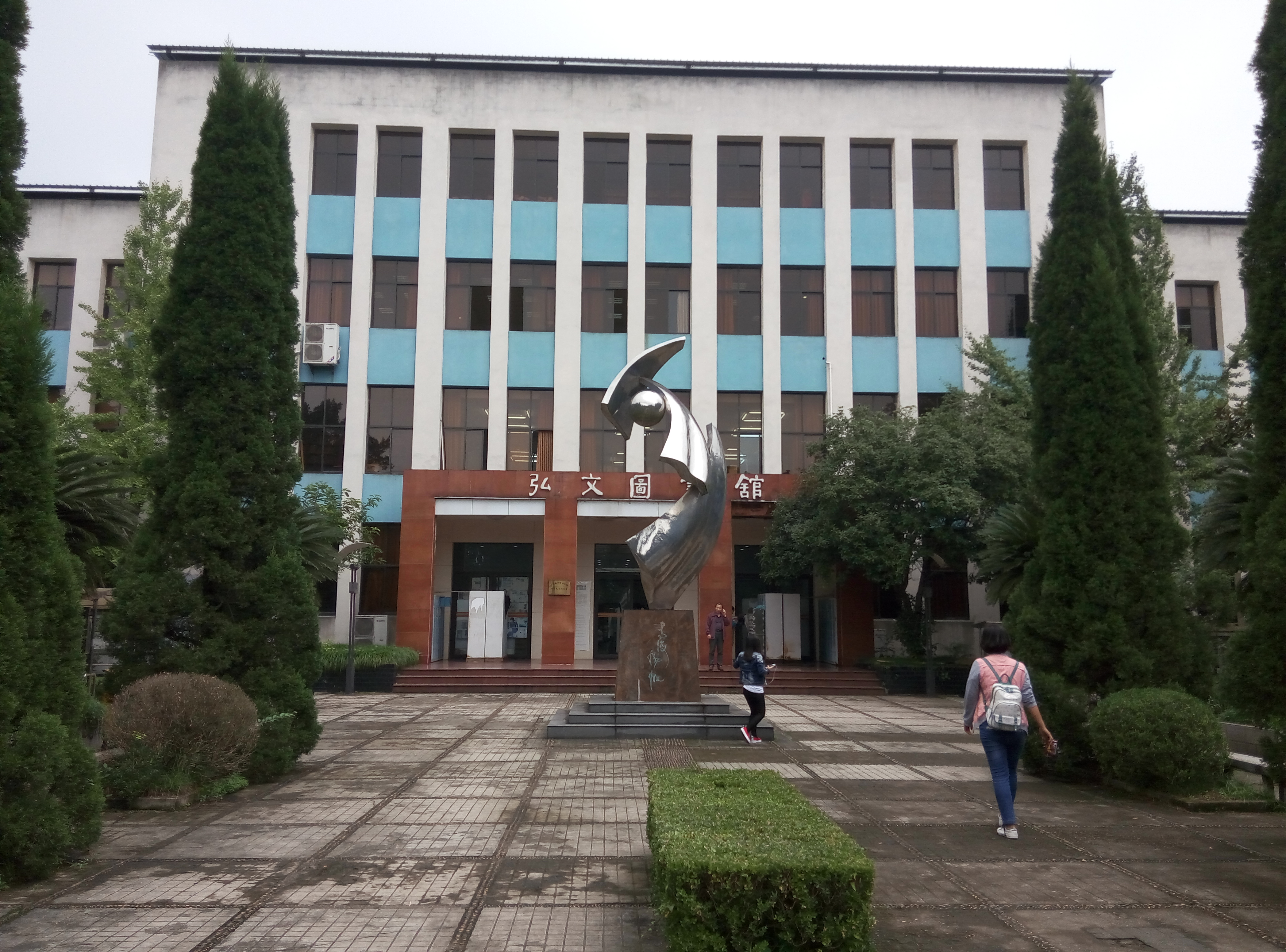 粵語: 西南大学入边嘅弘文图书馆